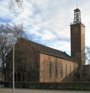 Markuskirche in Mannheim-Almenhof.